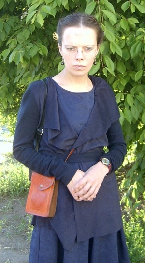 Н. Низовкина в Улан-Удэ